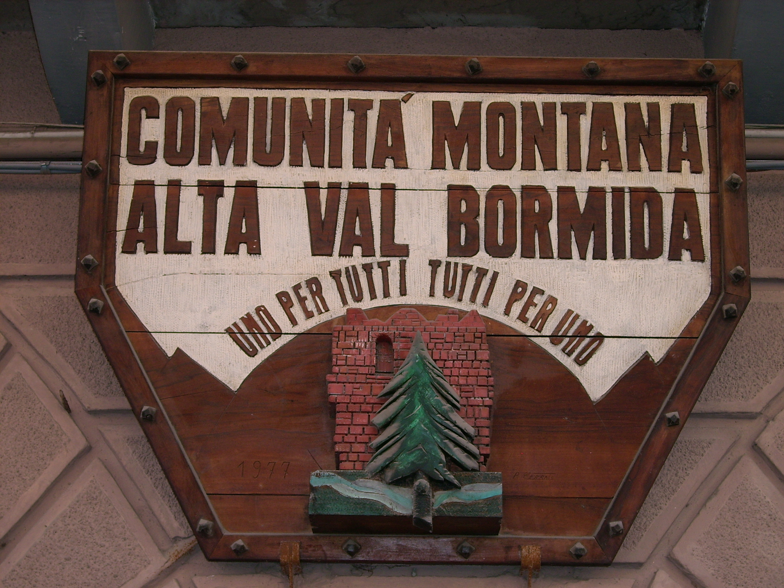 Targa della Comunità Montana Alta Val Bormida presso Millesimo, Liguria, Italia